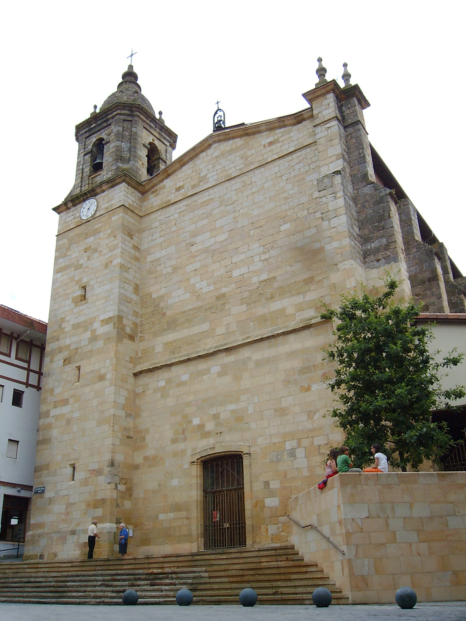 bermeo Santa Eufemia church